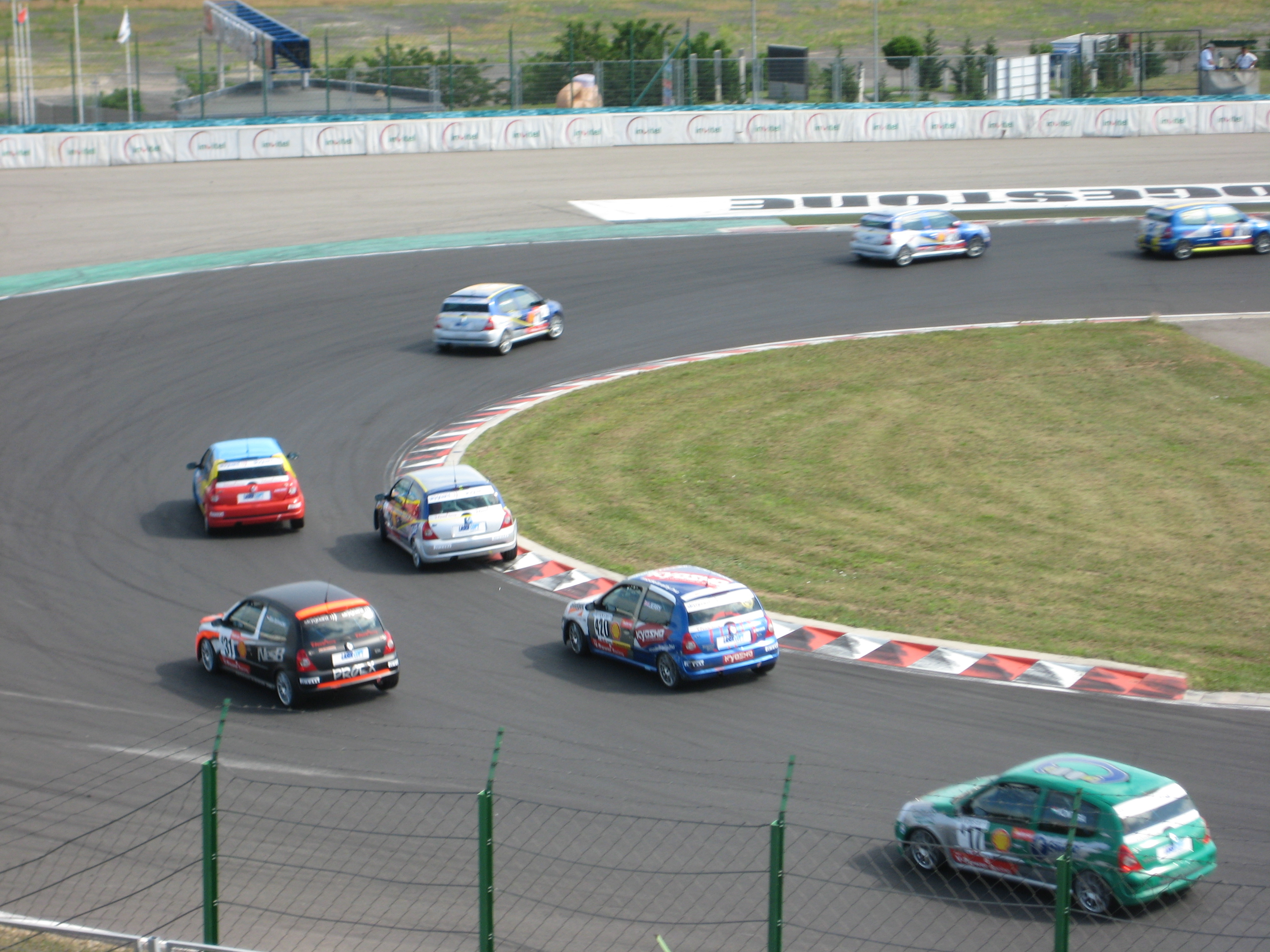 Hungary-Hungaroring-2007 Material Kupa